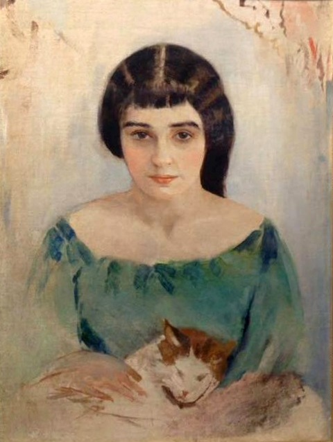 Иегуда Пэн. Две кошечки (Портрет Раисы Идельсон). 1908. Собрание Алисы Лабас. Москва